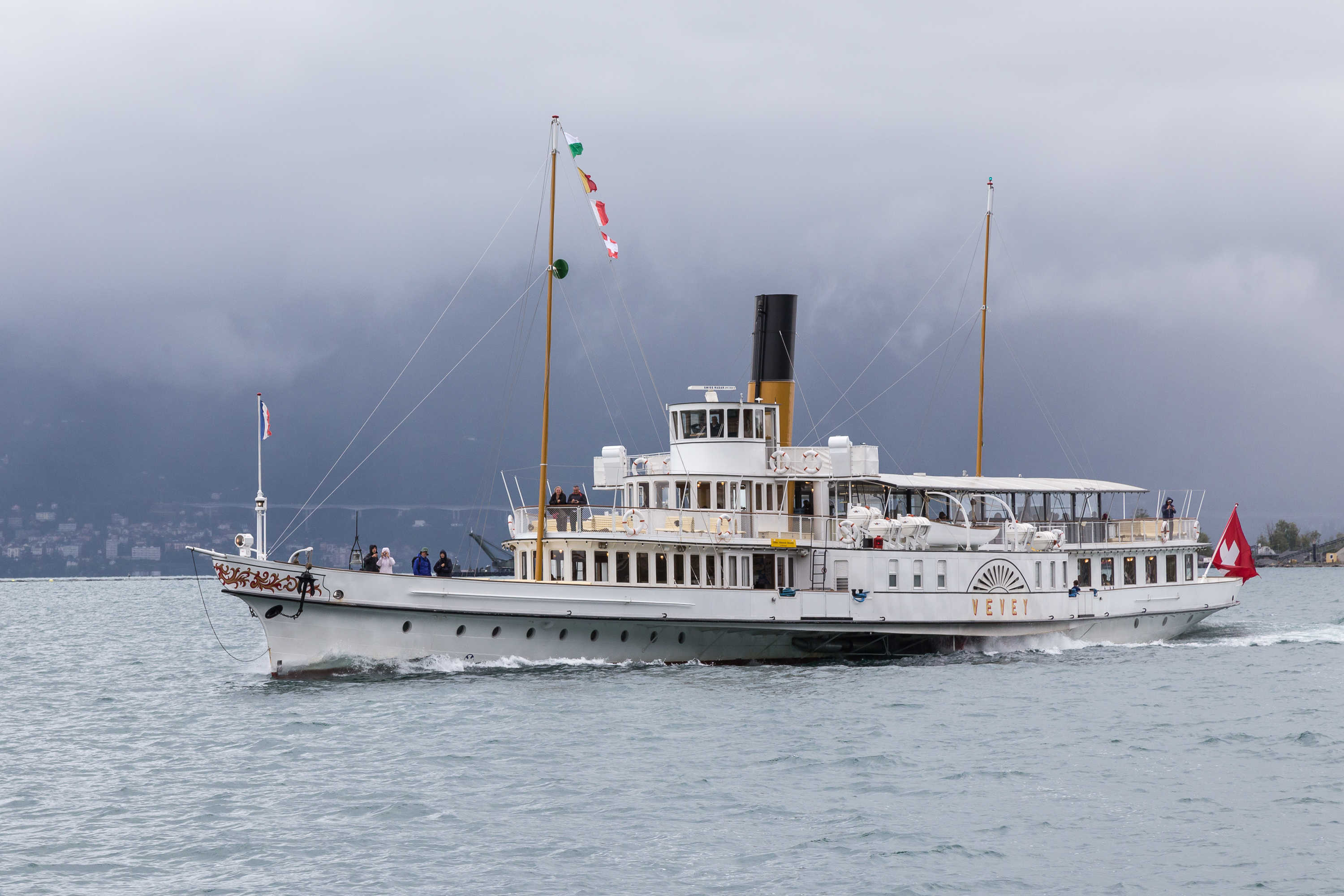 DS Vevey